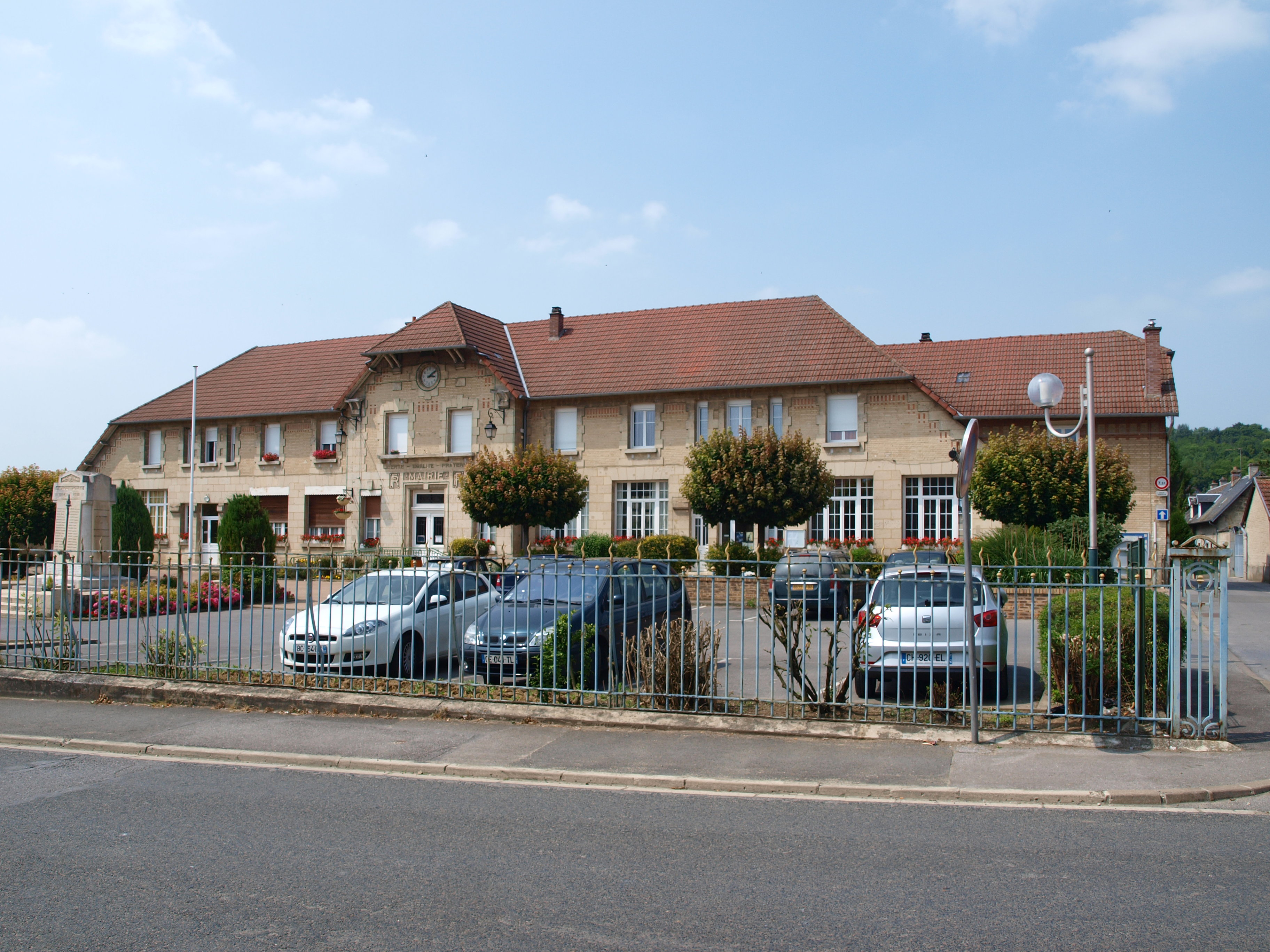 Crouy (Aisne, France) ; mairie